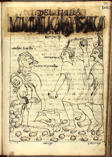 Adulteri